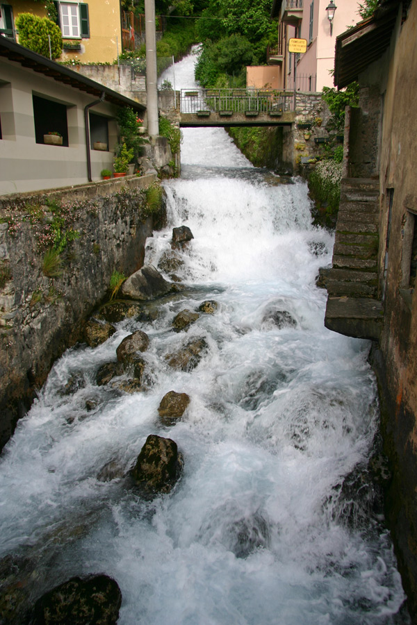 Veduta del torrente Fiumelatte, in provincia di Lecco